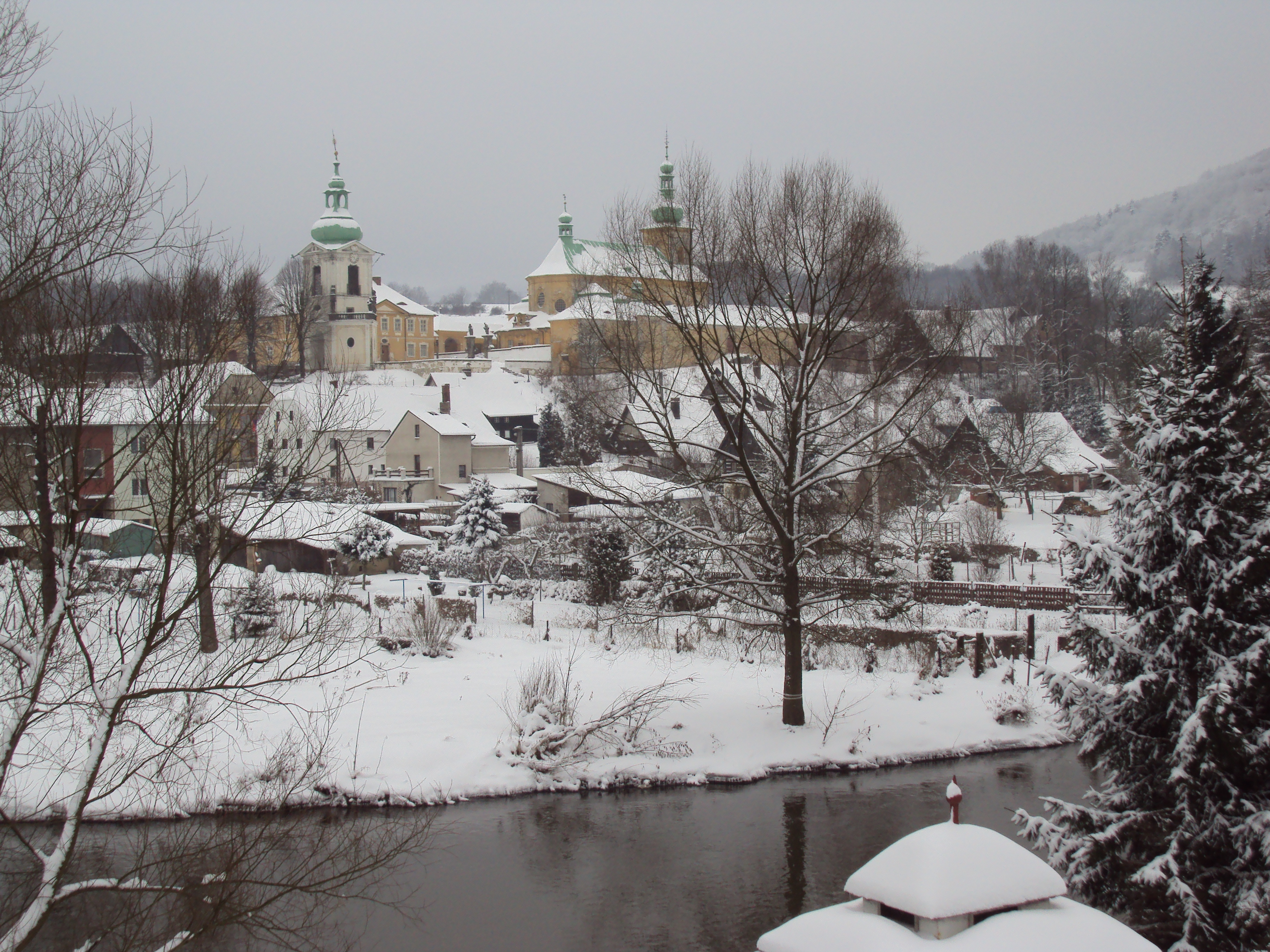 Areál poutního kostela Navštívení Panny Marie v Horní Polici na Českolipsku